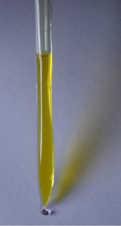 flüssiges Chlor in Glasampulle